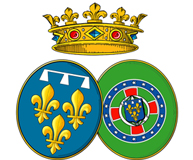 armoiries de Madame, Isabelle d'Orléans et Bragance